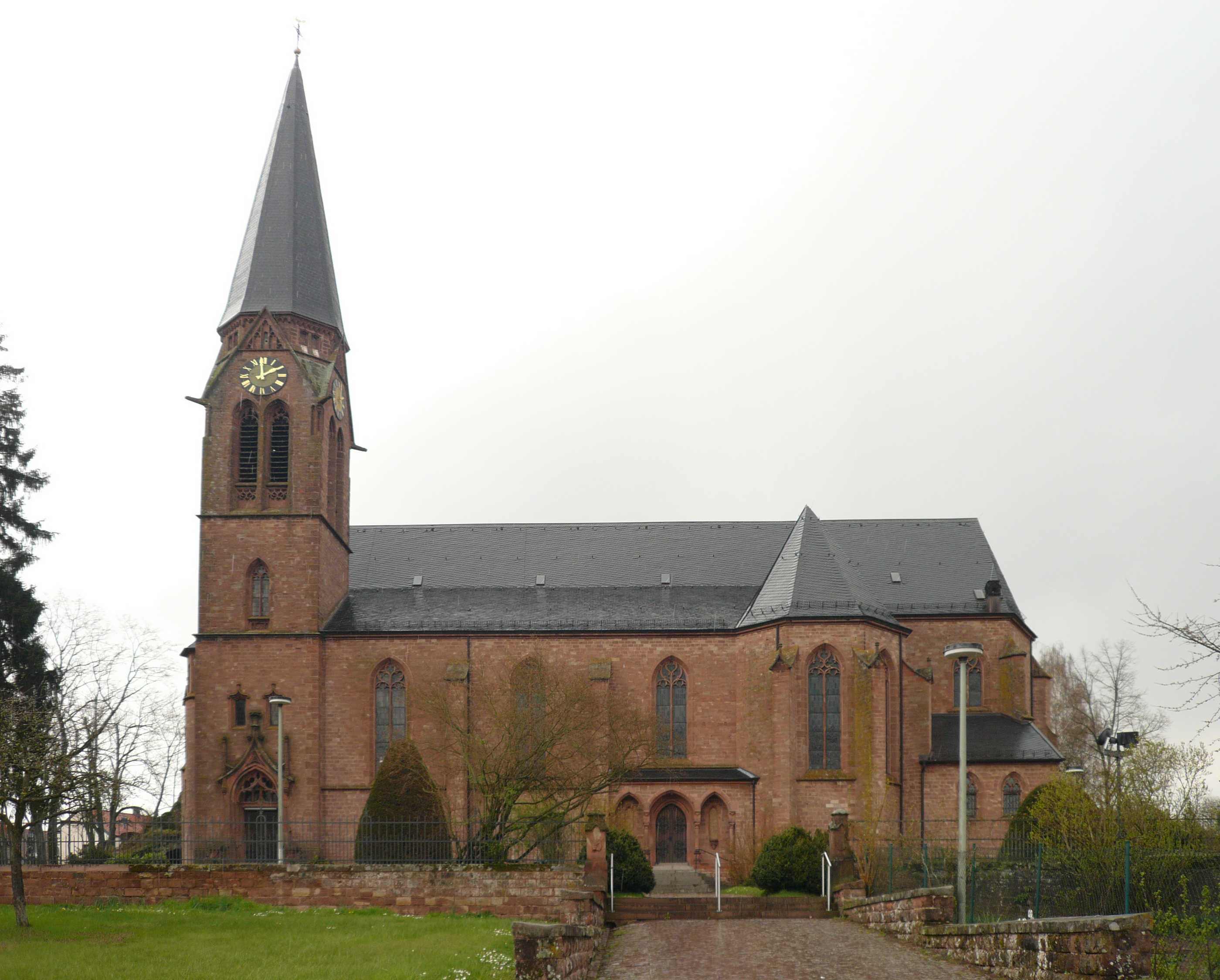 St Laurentius church in Contwig, built in 1906